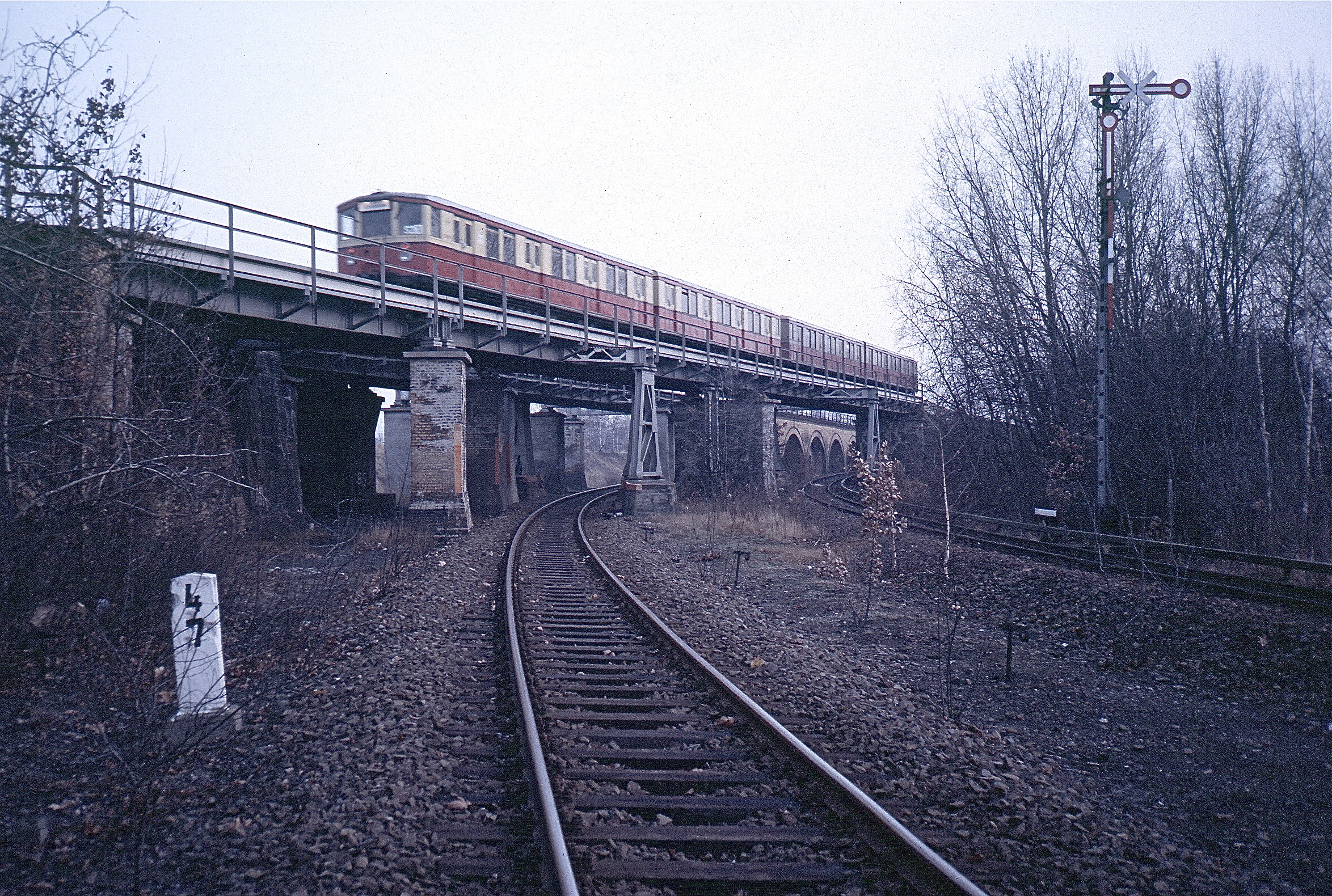 Abzweig Kremmener Bahn von der Berliner Nordbahn, Bauwerk steht unter Denkmalschutz